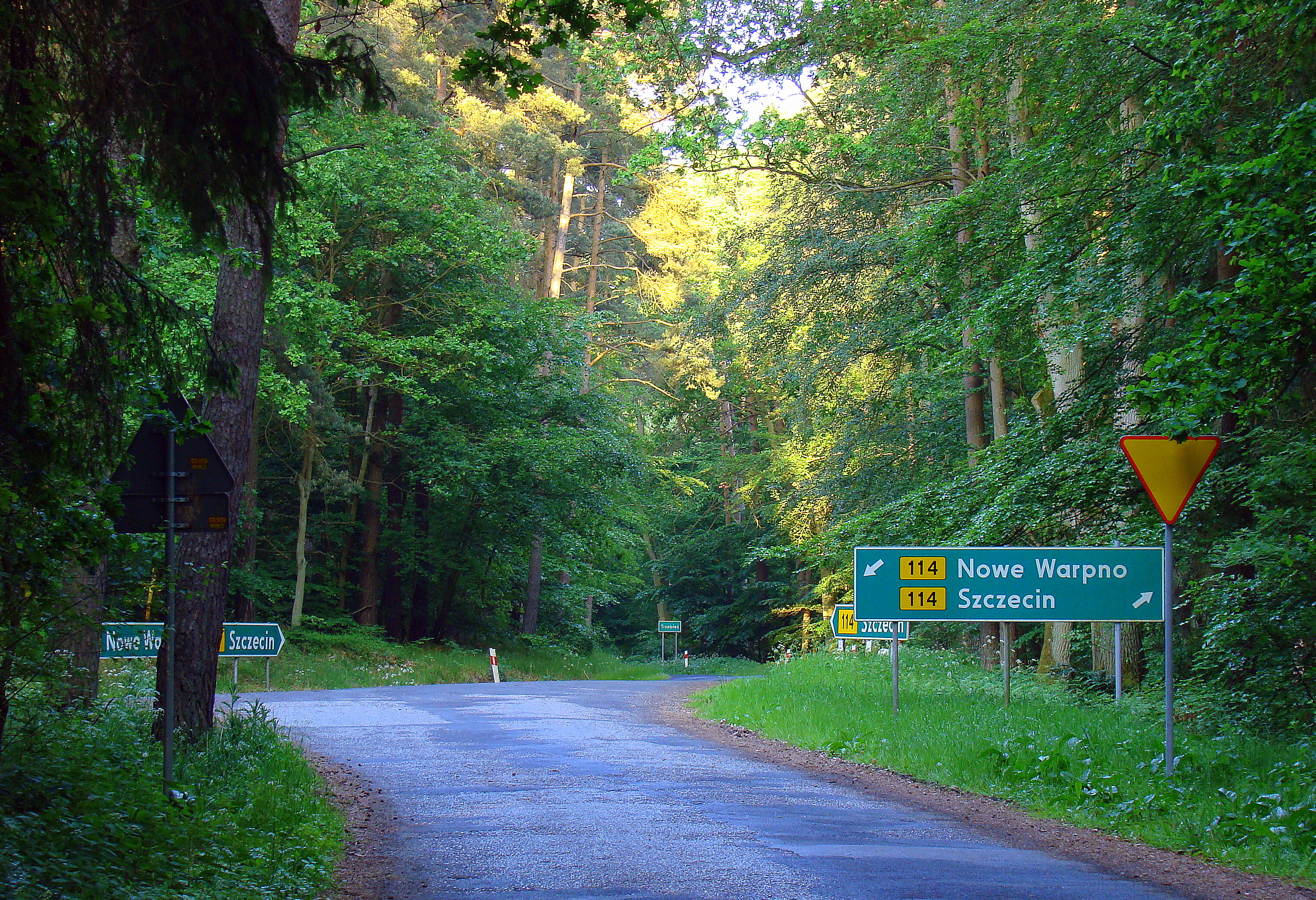 DW 114 k. Pienic, Puszcza Wkrzańska, (Powiat policki, Województwo zachodniopomorskie), Polska